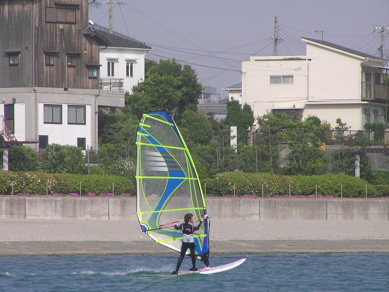 ウィンドサーフィン 二見海岸